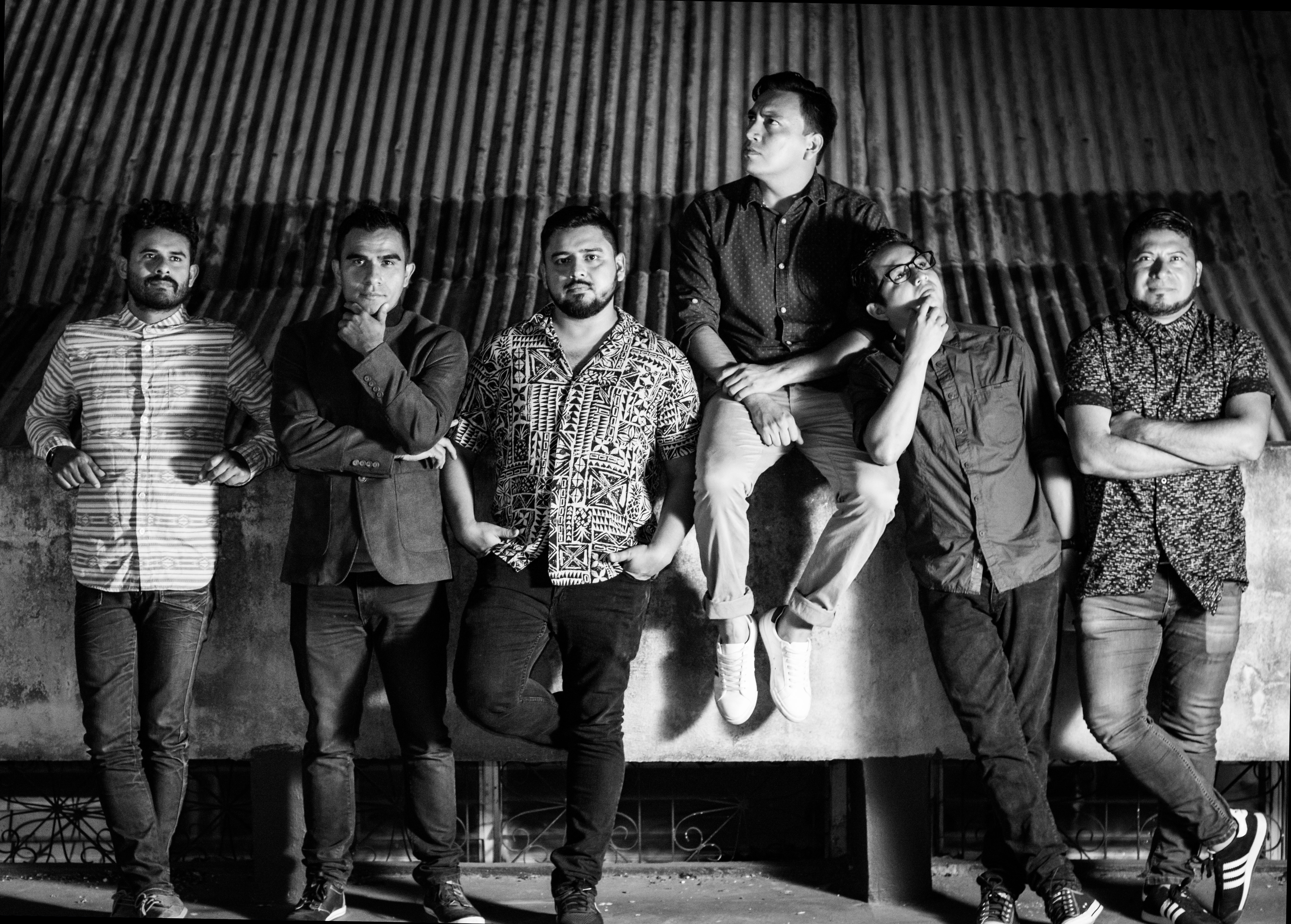 Kayland 2019.